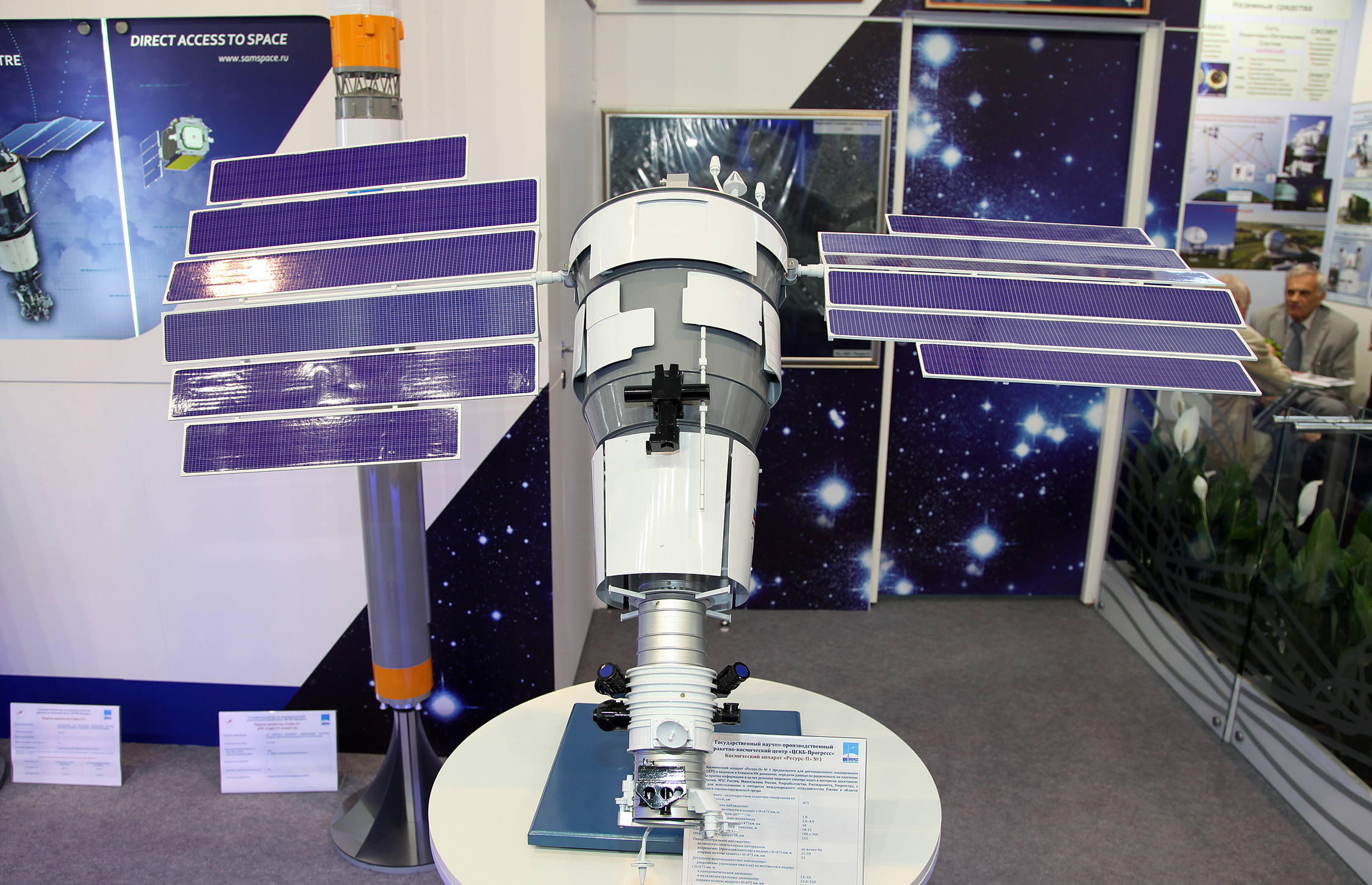 Космический аппарат Ресурс-П (Resurs-P spacecraft)